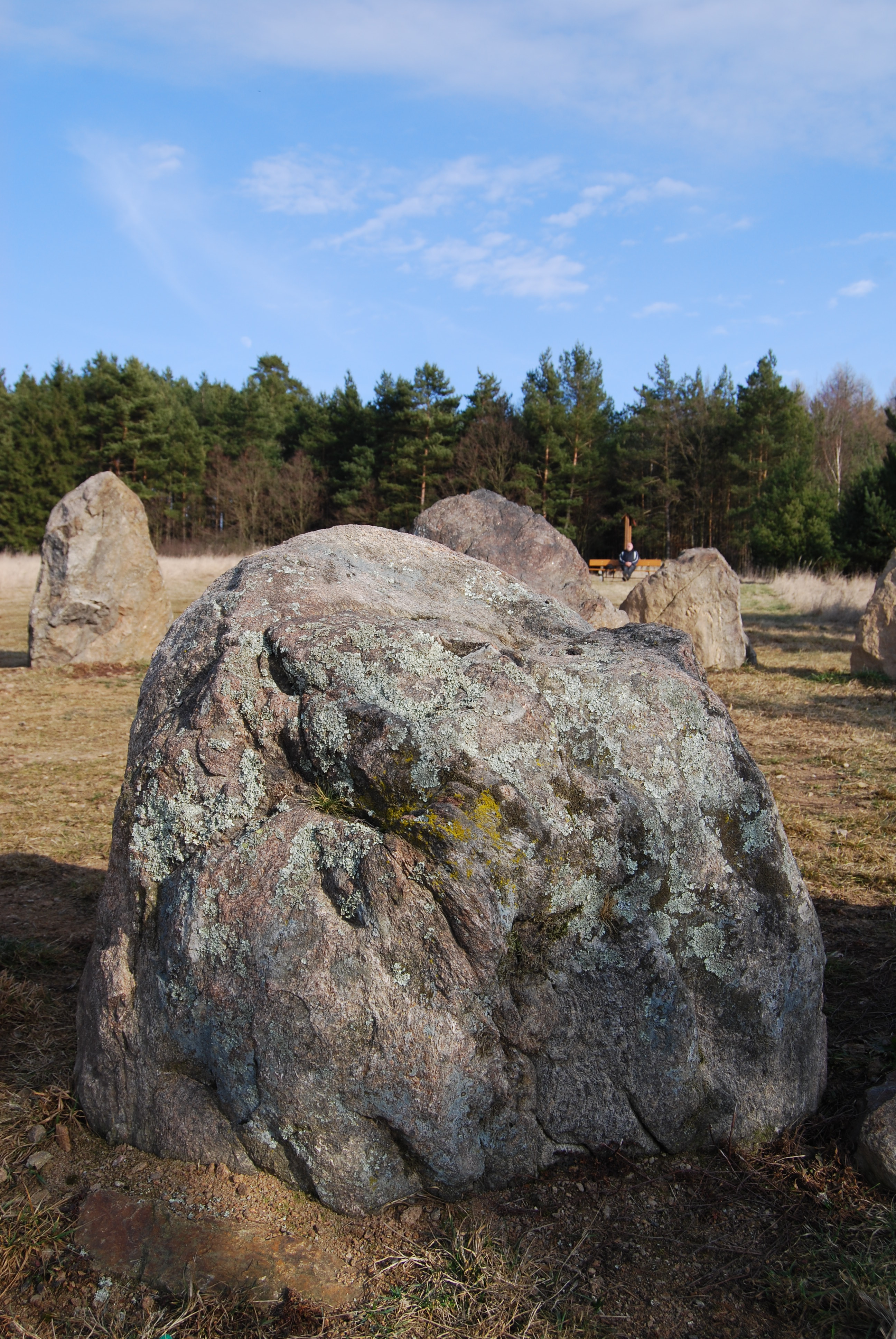 Jednotlivé umístěné kameny novodobé megalitické stavby v katastru obce nedaleko pod horou Tábor. Nazývají se Kruh. Nemějice je malá vesnice, část obce Slabčice v okrese Písek. Česká republika.